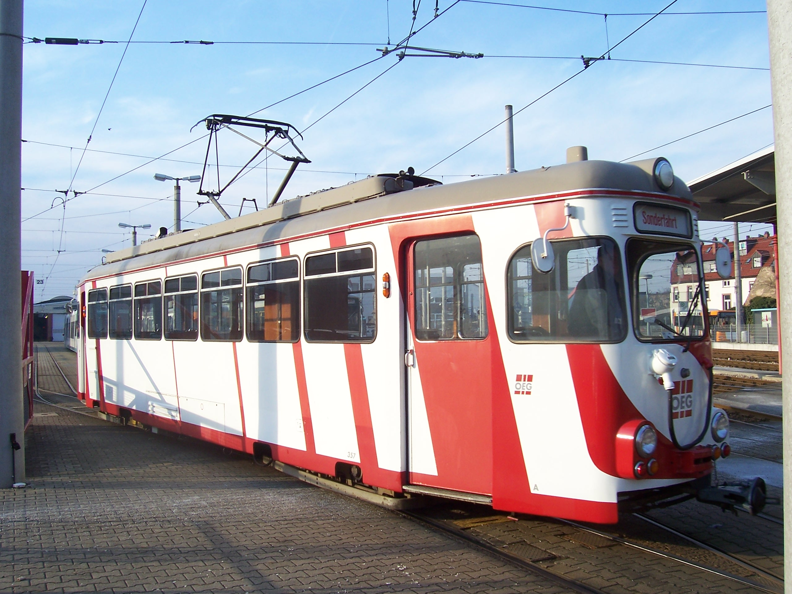 Arbeitstriebwagen Nummer 357 der OEG in Mannheim-Käfertal, vormals Großraumtriebwagen Nummer 76, gebaut 1963 von der Waggonfabrik Rastatt.